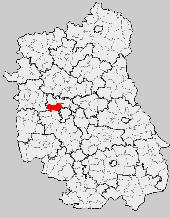 Map of gmina Jastków, Lublin county, Lublin voivodship Mapa gminy Jastków, powiat lubelski, województwo lubelskie